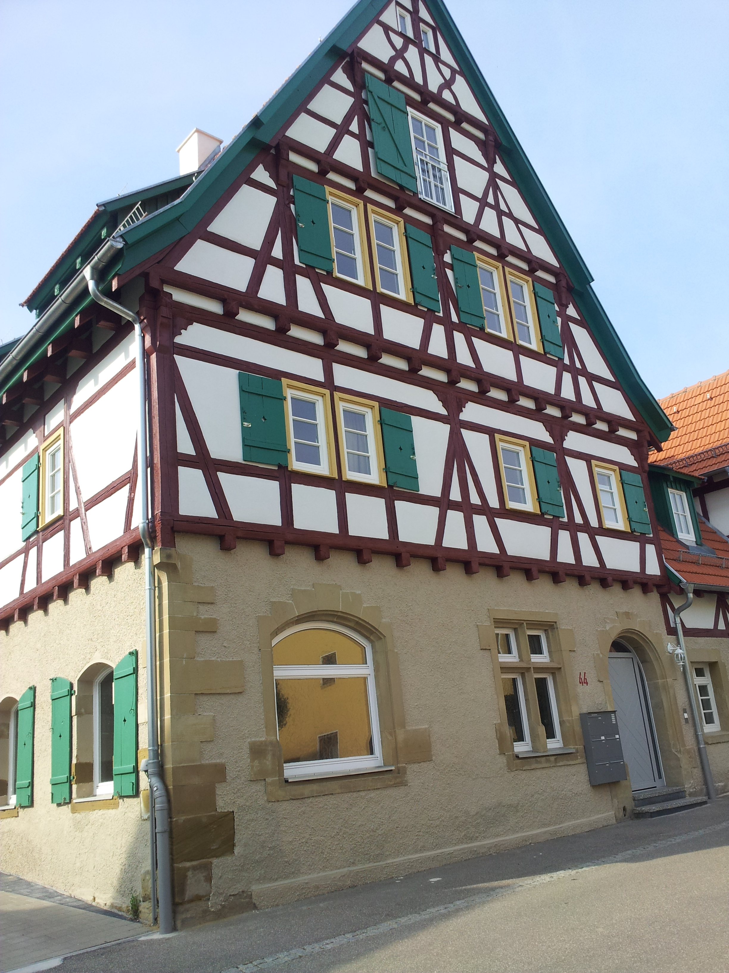 Ehemaliges Gasthaus Pfeffer in Stetten im Remstal.